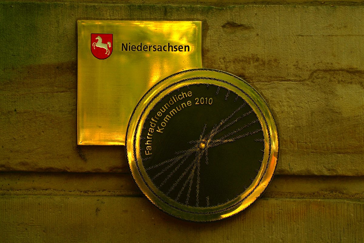 Sie haben ein besseres Bild? Sogar ein historisches Dokument als Bild(ungsförderung)? Zeigen Sie' s uns. Stiften Sie es Ihren Kindern, unseren Enkeln, allen Menschen. Hier.